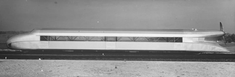 Die erste Propeller-Eisenbahn! Dieses neuartige Fahrzeug, auch Schienen-Zeppelin genannt, wird durch einen Propeller angetrieben und erreichte bei den Versuchsfahrten in Hannover eine Stundengeschwindigkeit von 180 km. Der Propeller-Triebwagen ist 26 m lang und kann ca. 46 Personen befördern. Die erste Propeller-Eisenbahn auf der Versuchsstrecke der Reichsbahn bei Hannover während der Probefahrten.